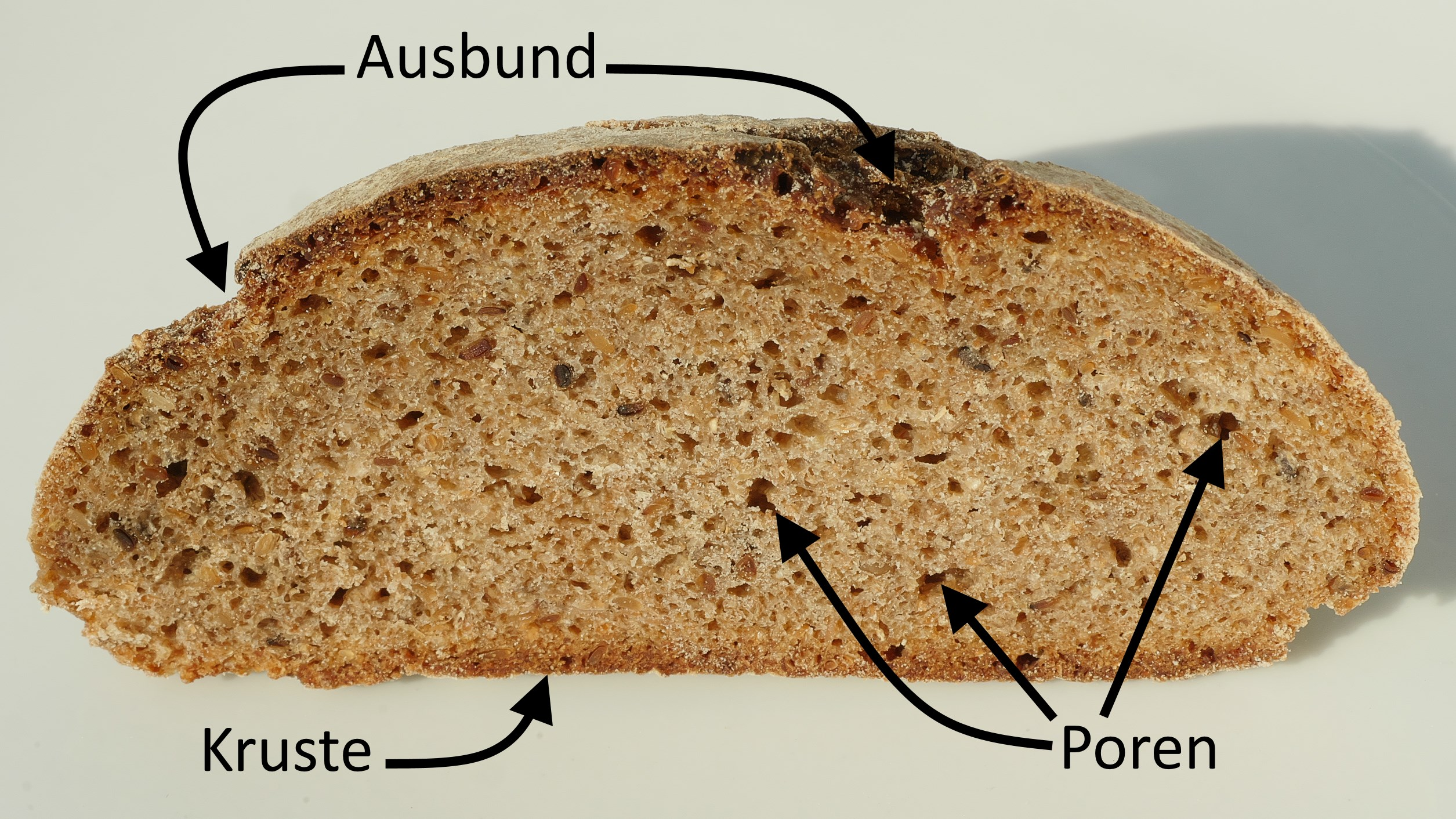 Kruste, Ausbund und Poren beim Endstück eines Roggenvollkornbrots.